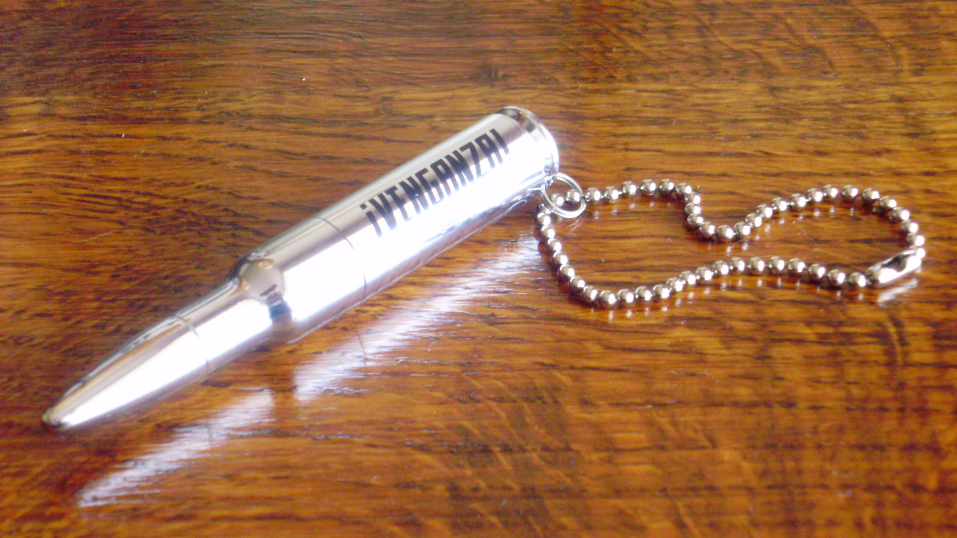 Pendrive de la banda My Chemical Romance, llamado ¡Venganza!.